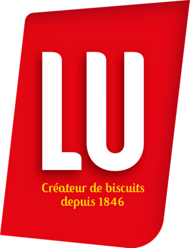 Logo von Lefèvre-Utile